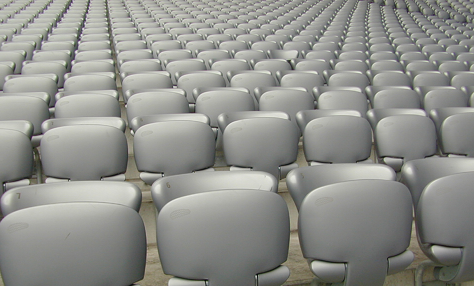 Die Sitzreihen in der leeren Allianz-Arena